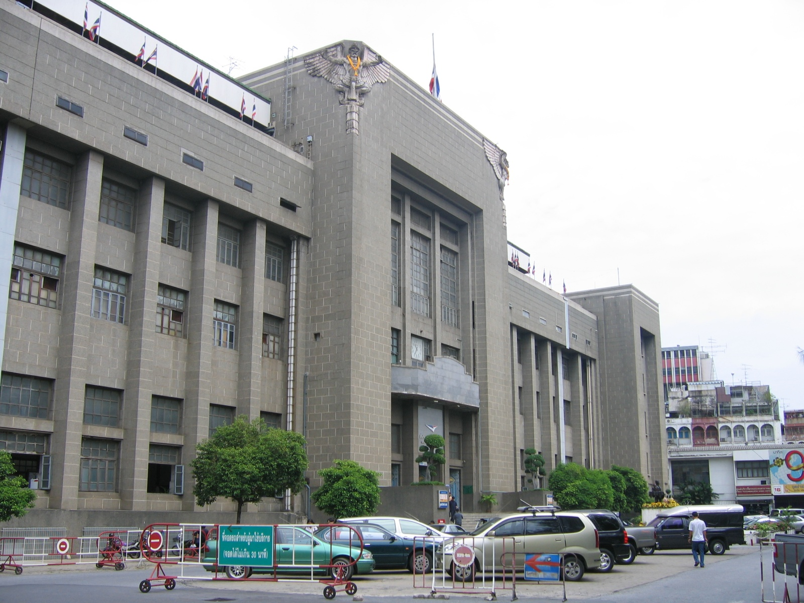 Bangkok General Post Office, Bang Rak, Bangkok, Thailand.